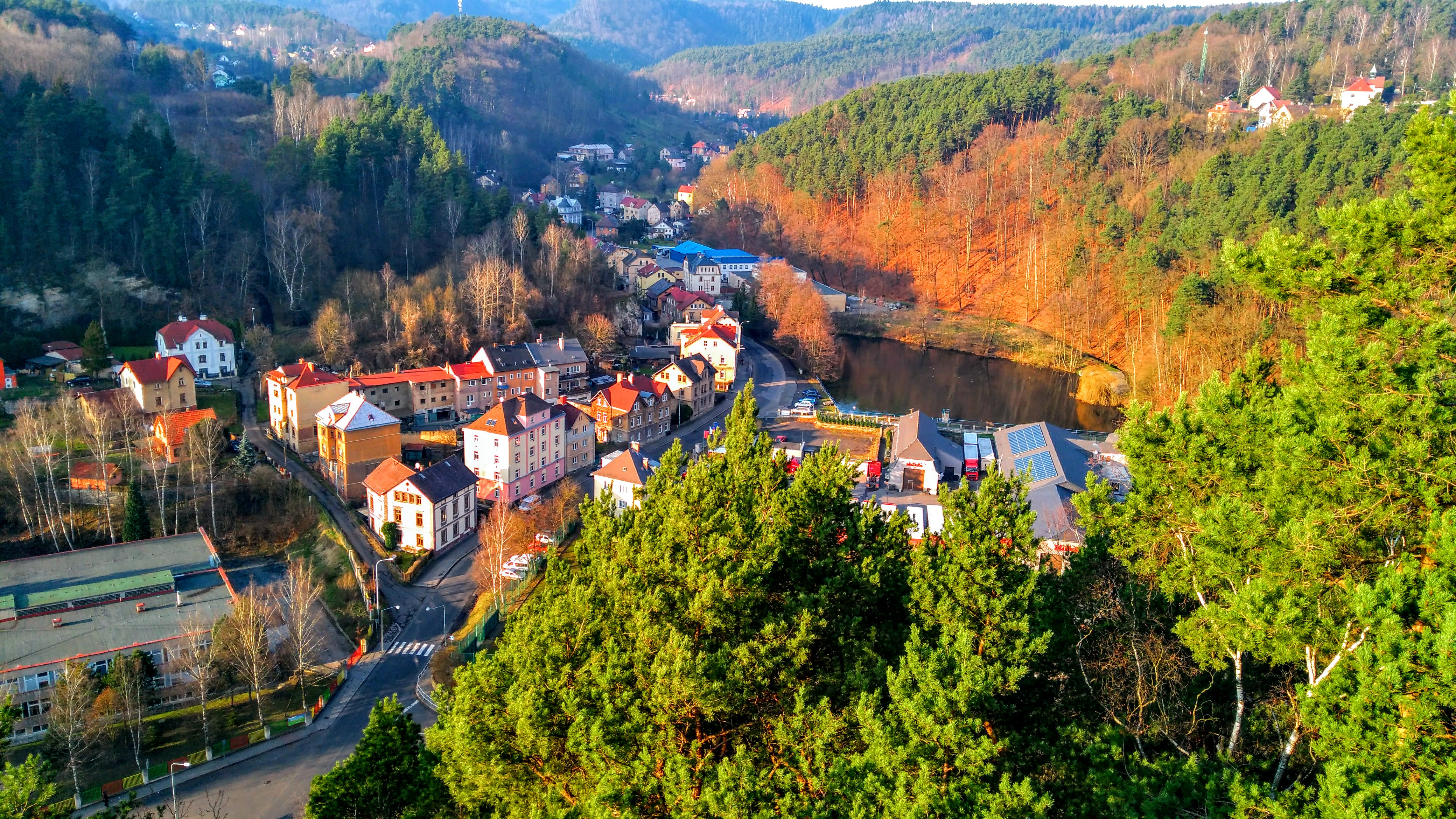 Bělá a Terezínský rybník (Bělský potok).